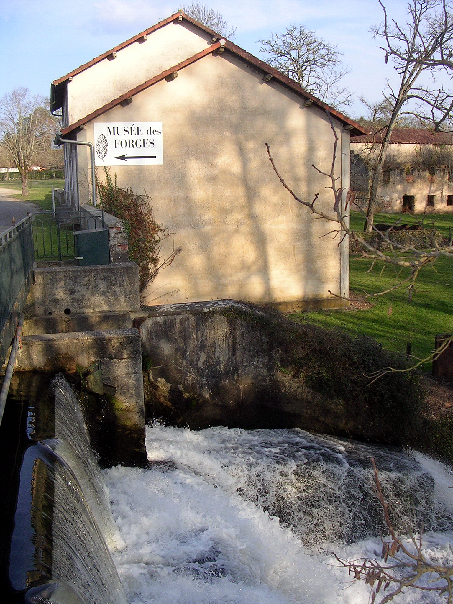 L'Estrigon à Brocas, dans le département français des Landes : ancien moulin à eau accueillant le musée des Forges